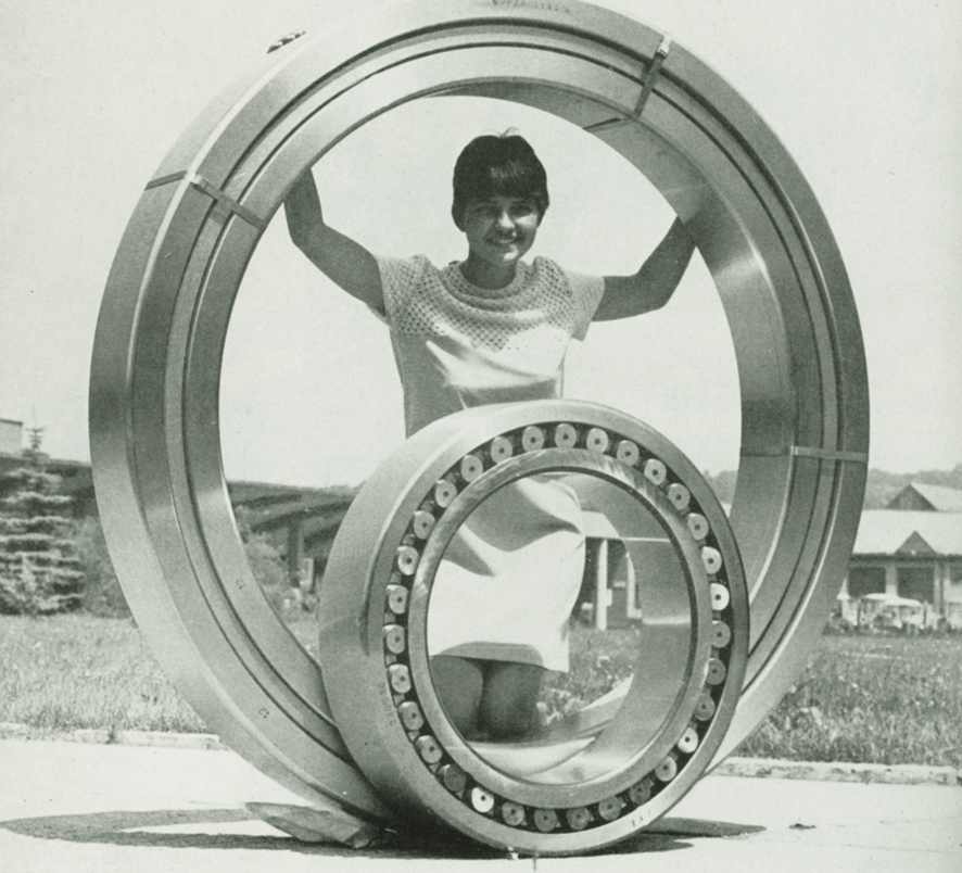 Historické propagační foto ložisek ZKL přímo před výrobním závodem v Brně